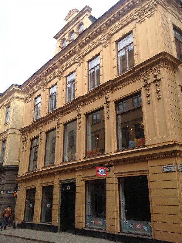 Stora Nygatan 7